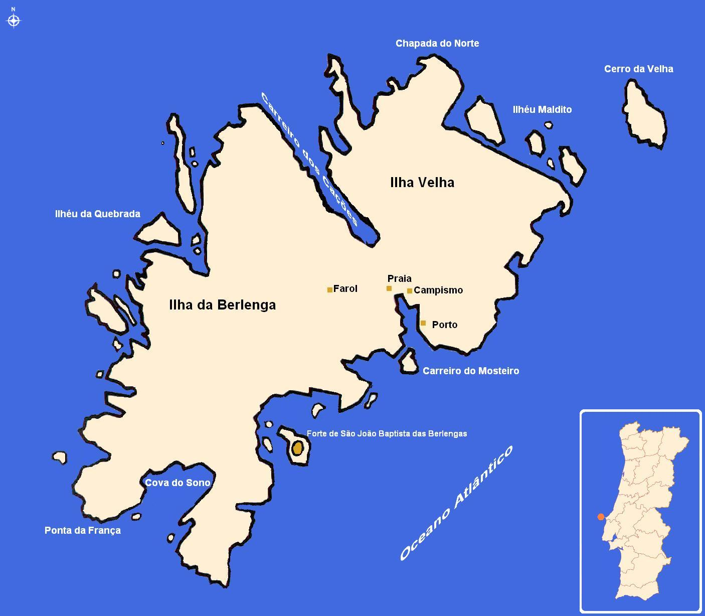 Mapa Arquipélago das Berlengas